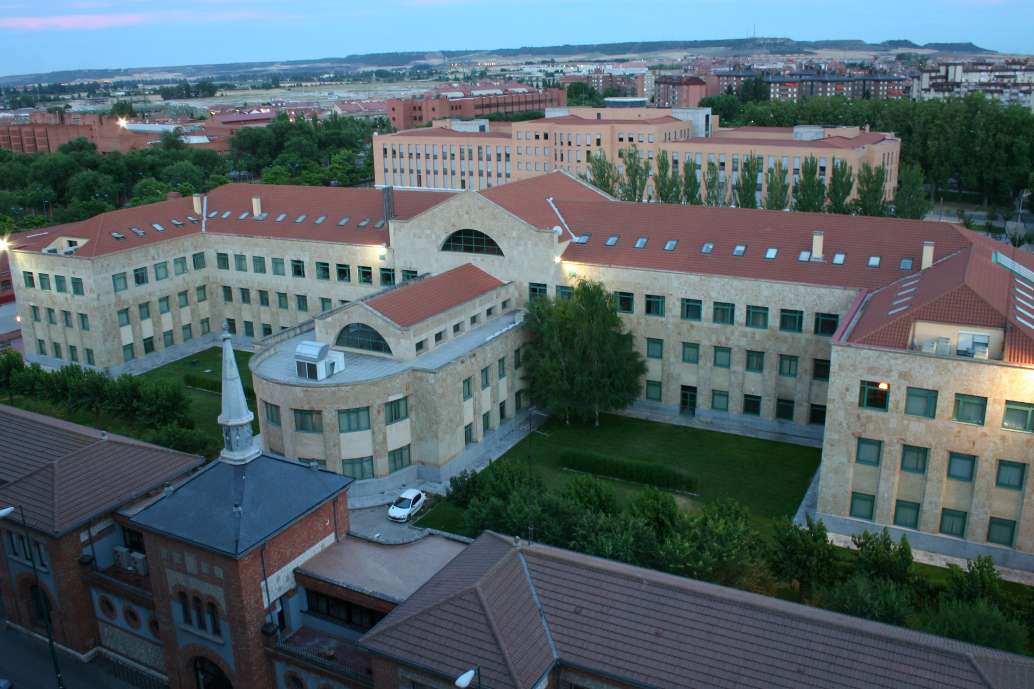 Estudiando